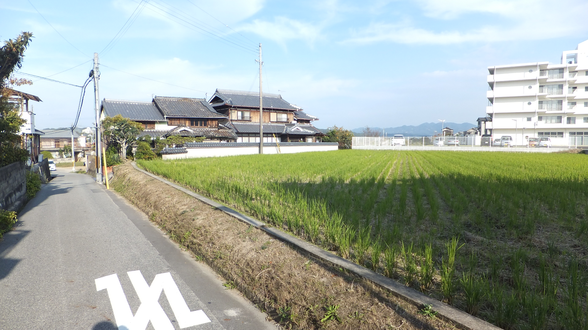 兵庫県三木市大塚